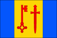 Božice, vlajka. List tvoří tři svislé pruhy, modrý, žlutý a modrý, v poměru 1:2:1. Ve žlutém pruhu klíč zuby nahoru a k vlajícímu okraji a meč hrotem dolů, obojí červené. Poměr šířky k délce listu je 2:3.